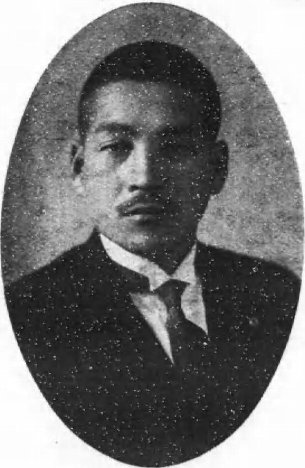 川嶋孝彦（1897-1958）